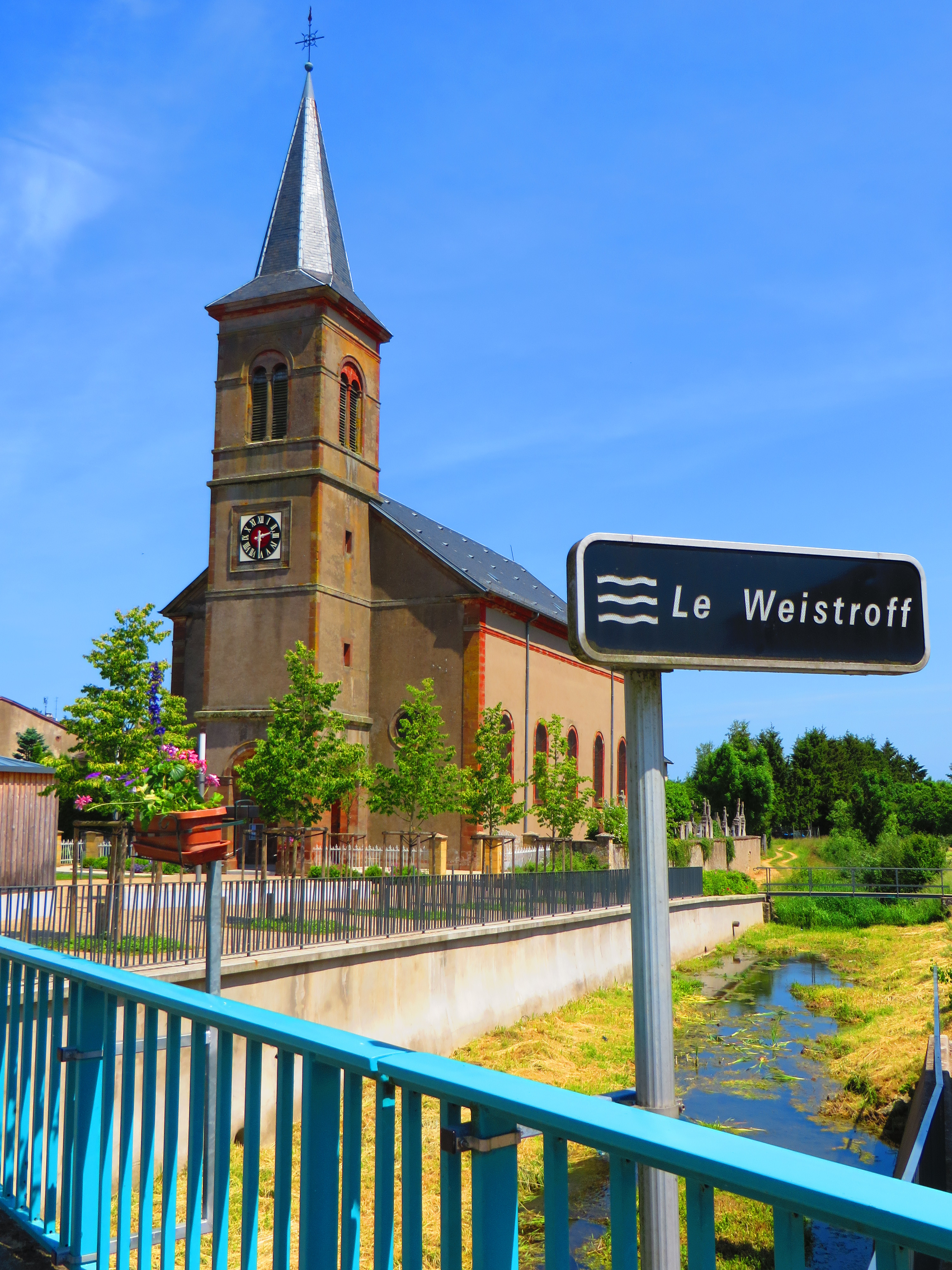 Waldweistroff eglise